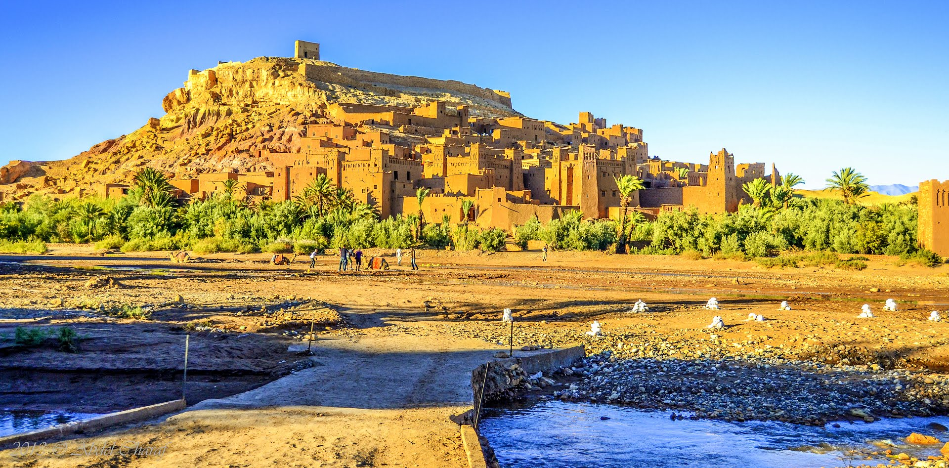 Kasbah de Ait Ben Haddou